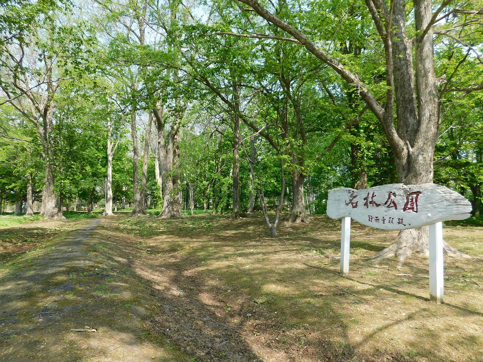 北海道天塩郡幌延町にある名林公園の入口